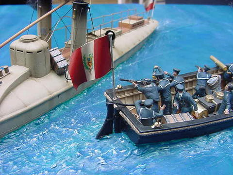 Foto de modelo a escala del combate naval del Callao del 25 de mayo de 1880 entre la torpedera chilena Janequeo y la lancha peruana Independencia